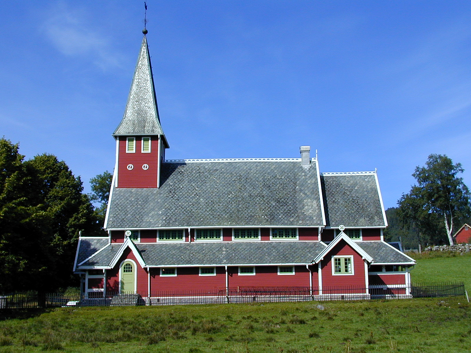 Rødven kirke. Foto: Max Ingar Mørk, fra Riksantikvarens Kulturminnebilder.no.